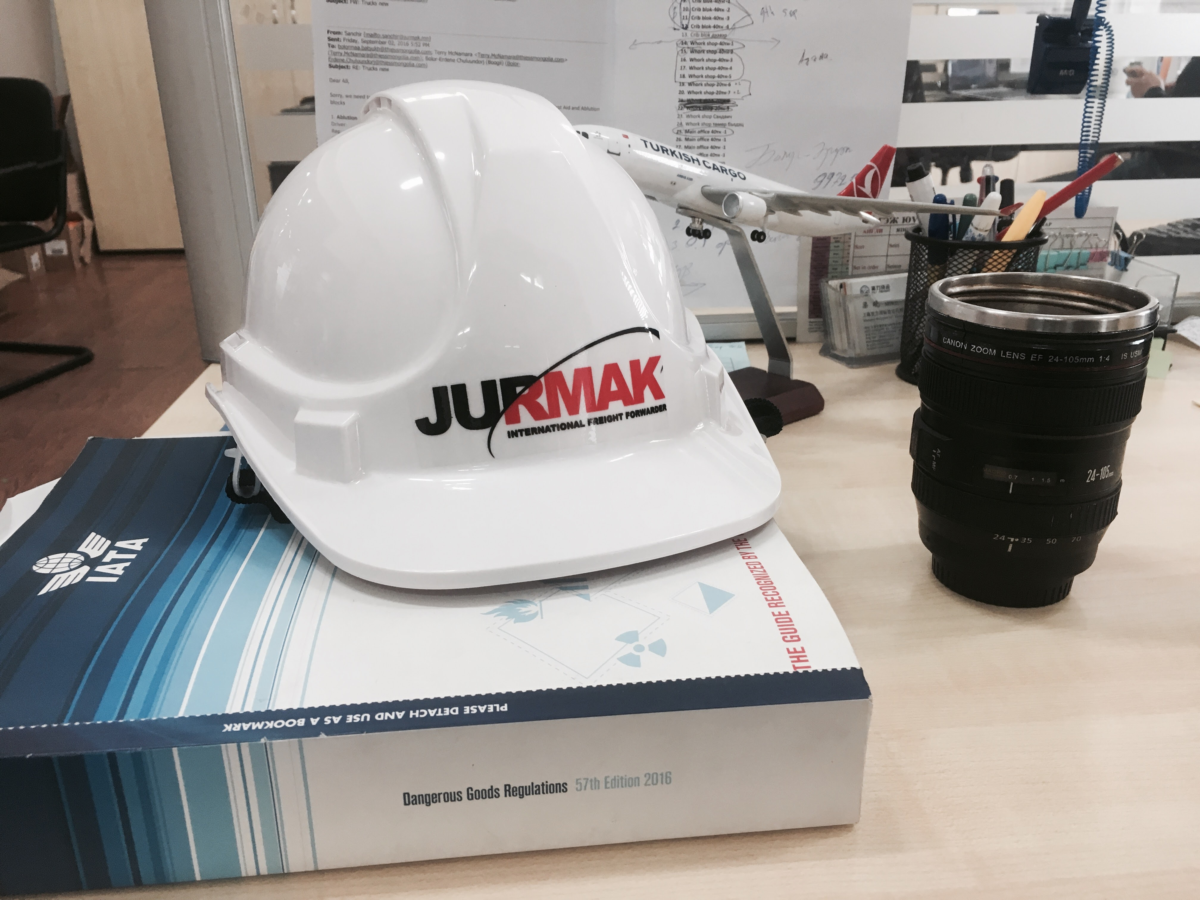 Монгол: Ачилчны хамгаалах малгай